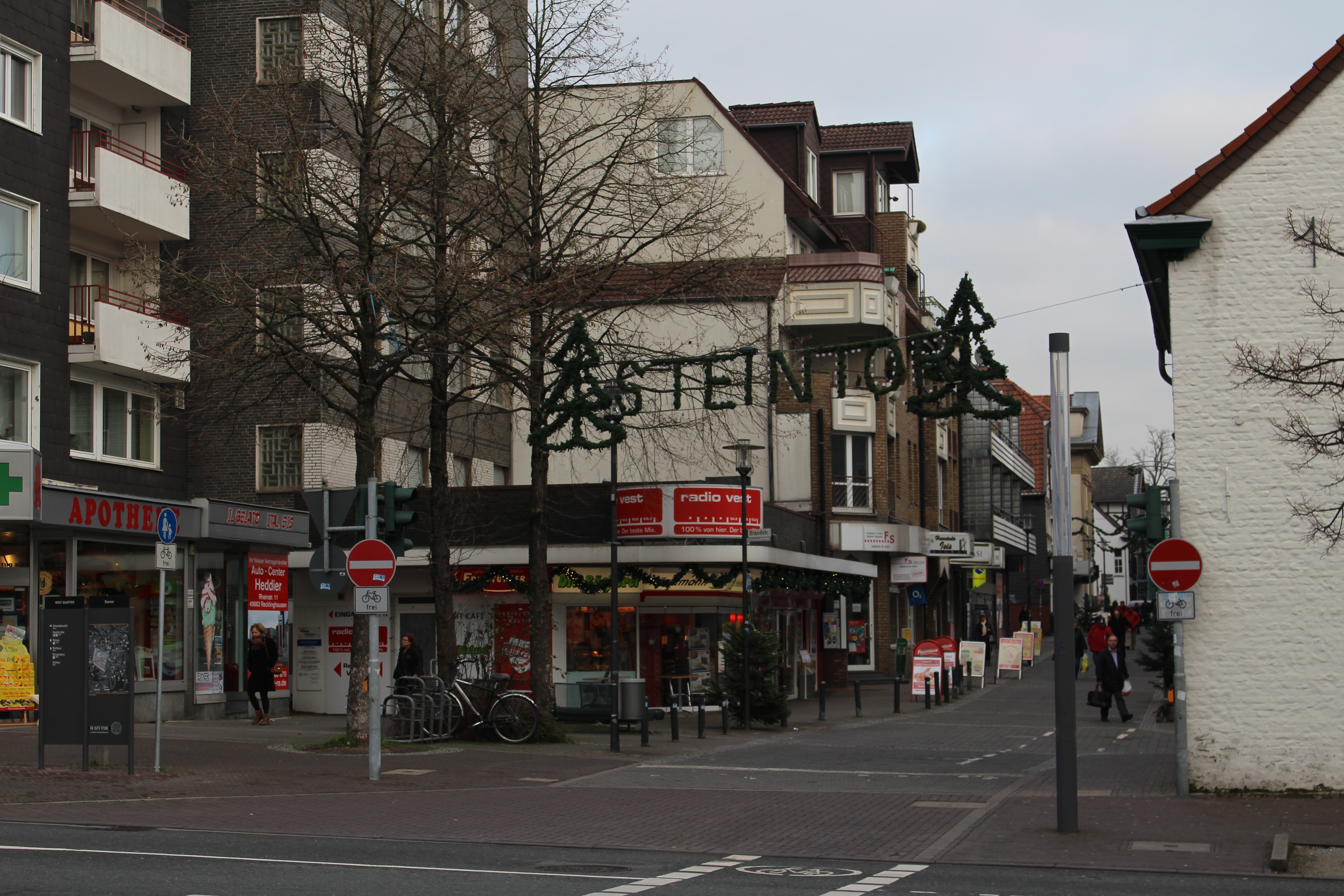 Innenstadt (Übergang zur Steinstraße) - RECKLINGHAUSEN